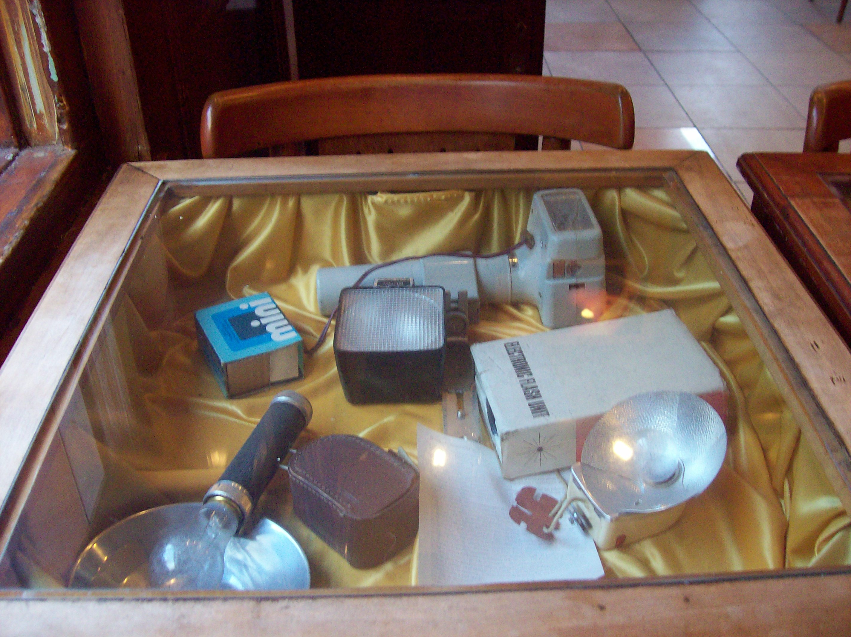 Museo Fotográfico Simik, en Chacarita, Buenos Aires, Argentina.